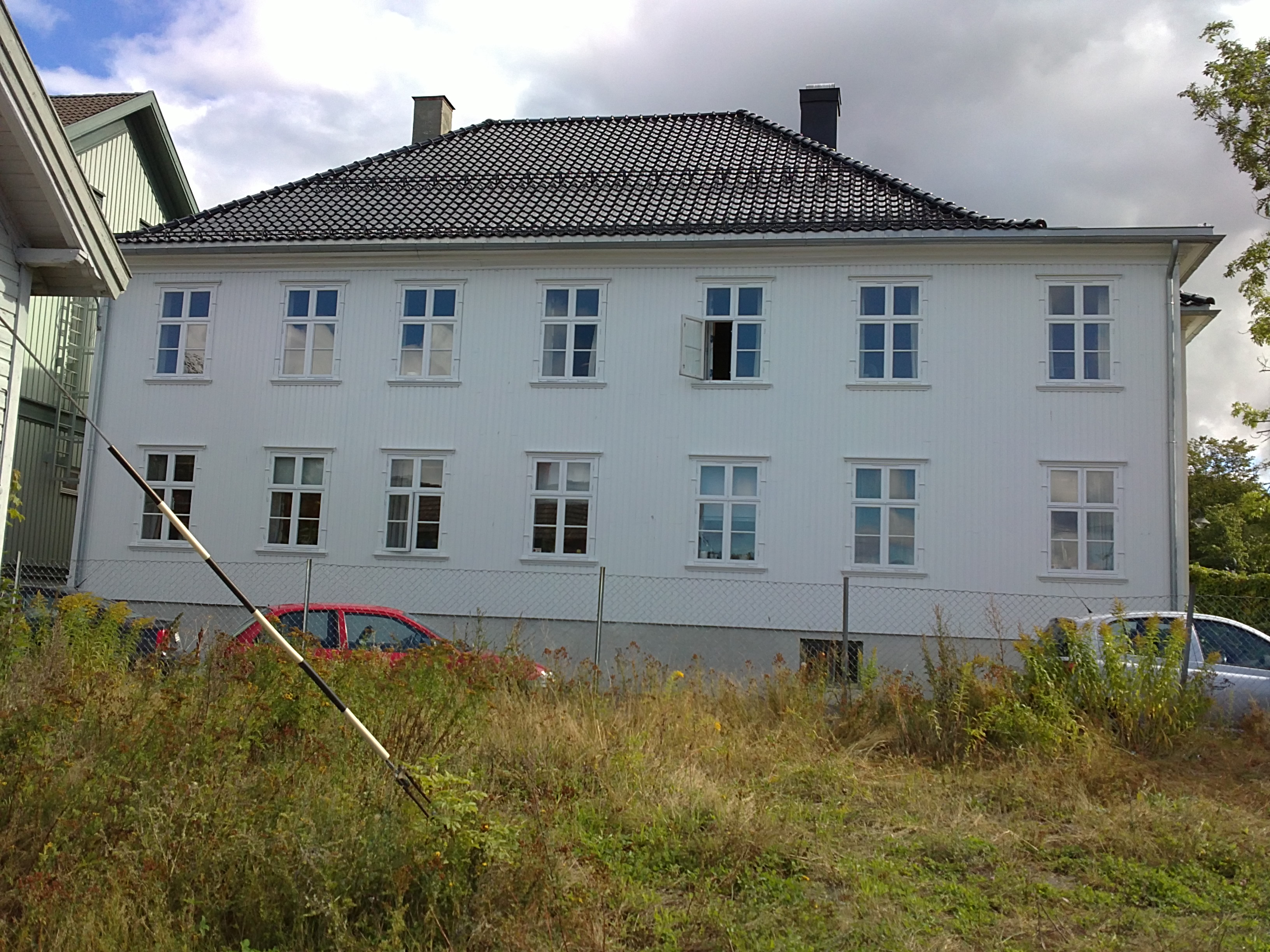 Bilde av Kirkestredet 6, barndomshjemmet til Sophus Bugge samt Edle og Egil Hartmann